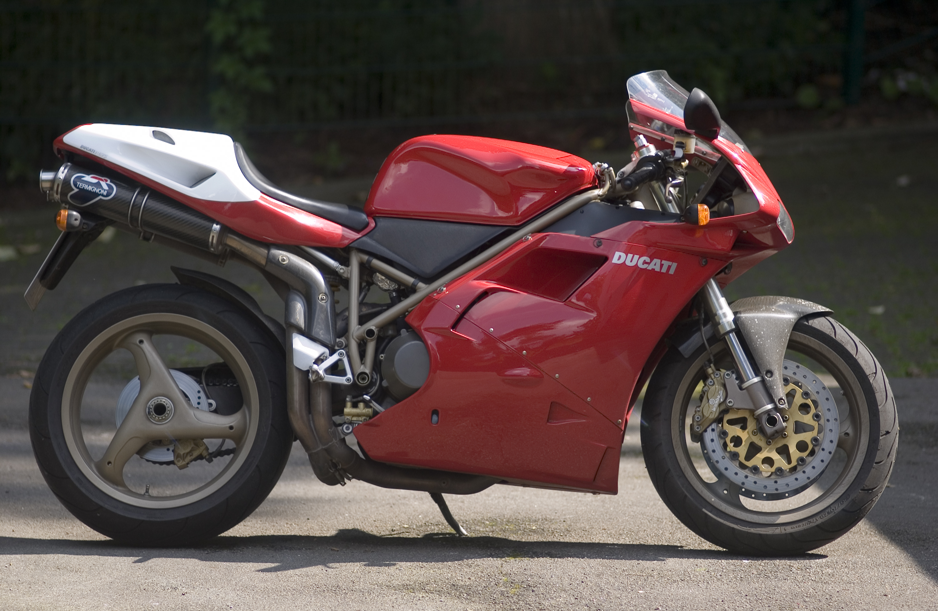 Ducati 916 SPS Baujahr 1998